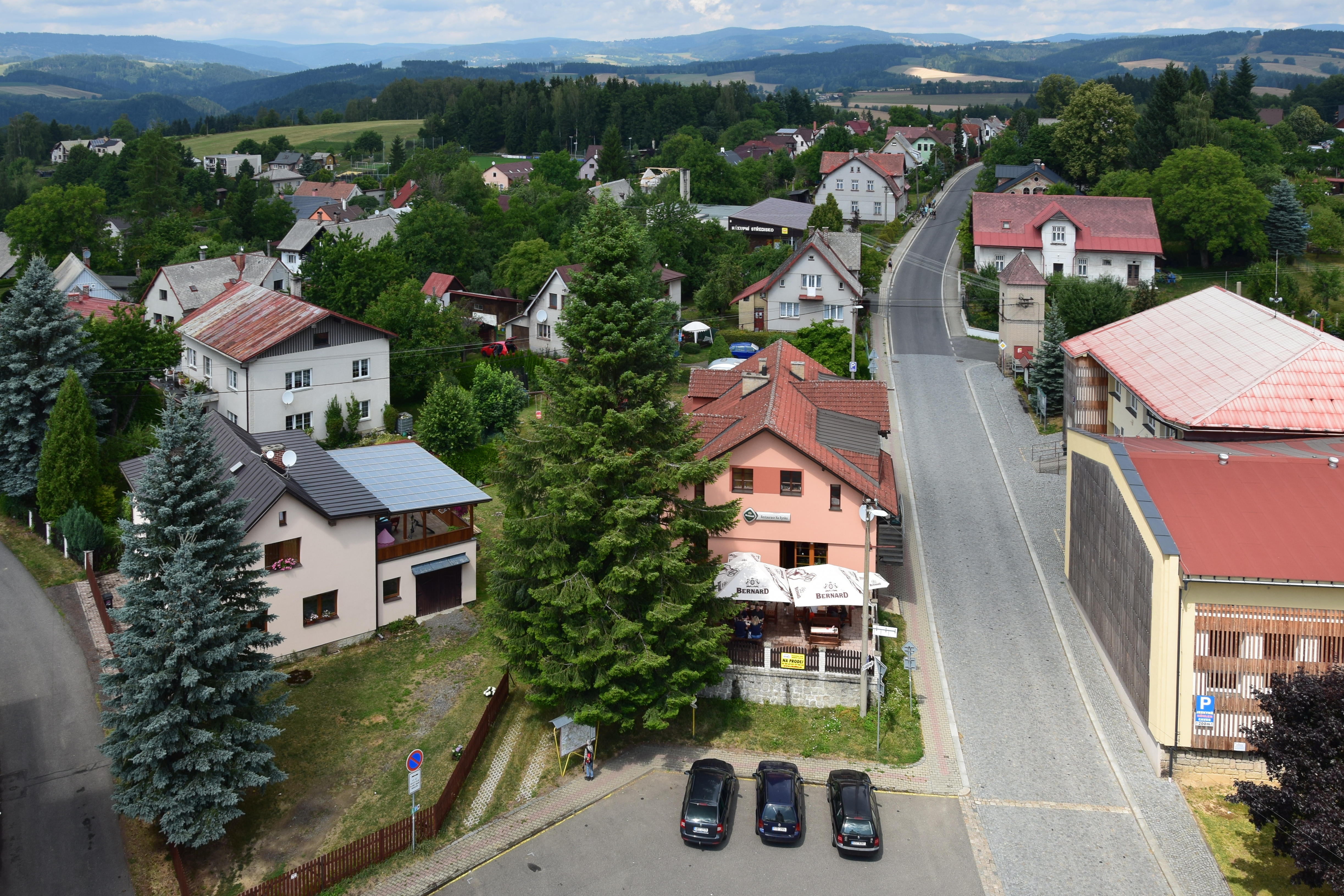 Výhled z věže bozkovského kostela Navštívení Panny Marie směrem k severu